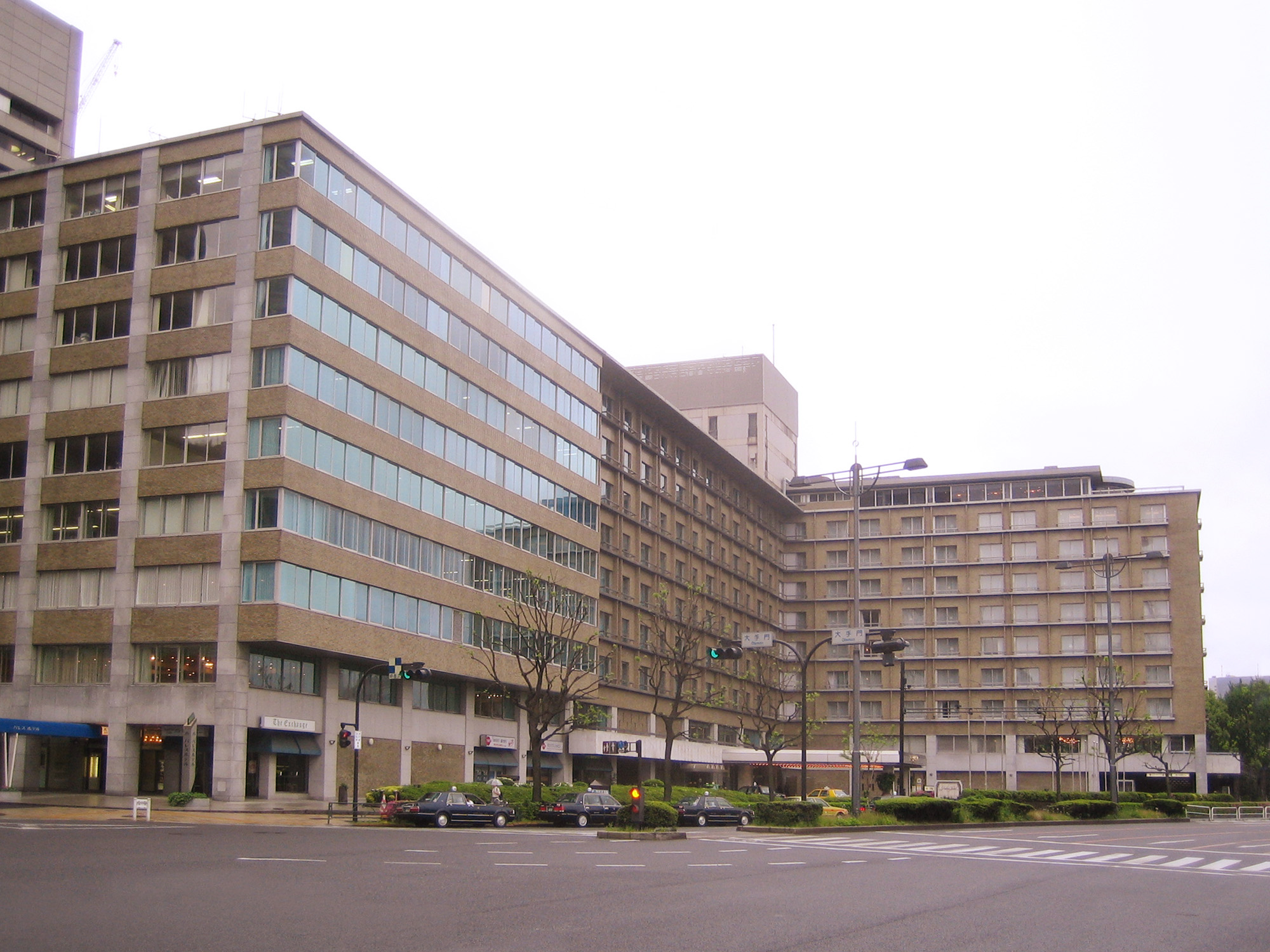 Palace Hotel (パレスホテル), in Chiyoda, Tokyo, Japan